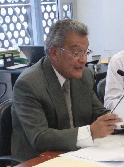 Asamblea Nacional del Ecuador. Comisión de Participación Ciudadana recibe a Carlos Vallejo. Crooped from File:Comisión de Participación Ciudadana recibe a Carlos Vallejo (4541974218).jpg